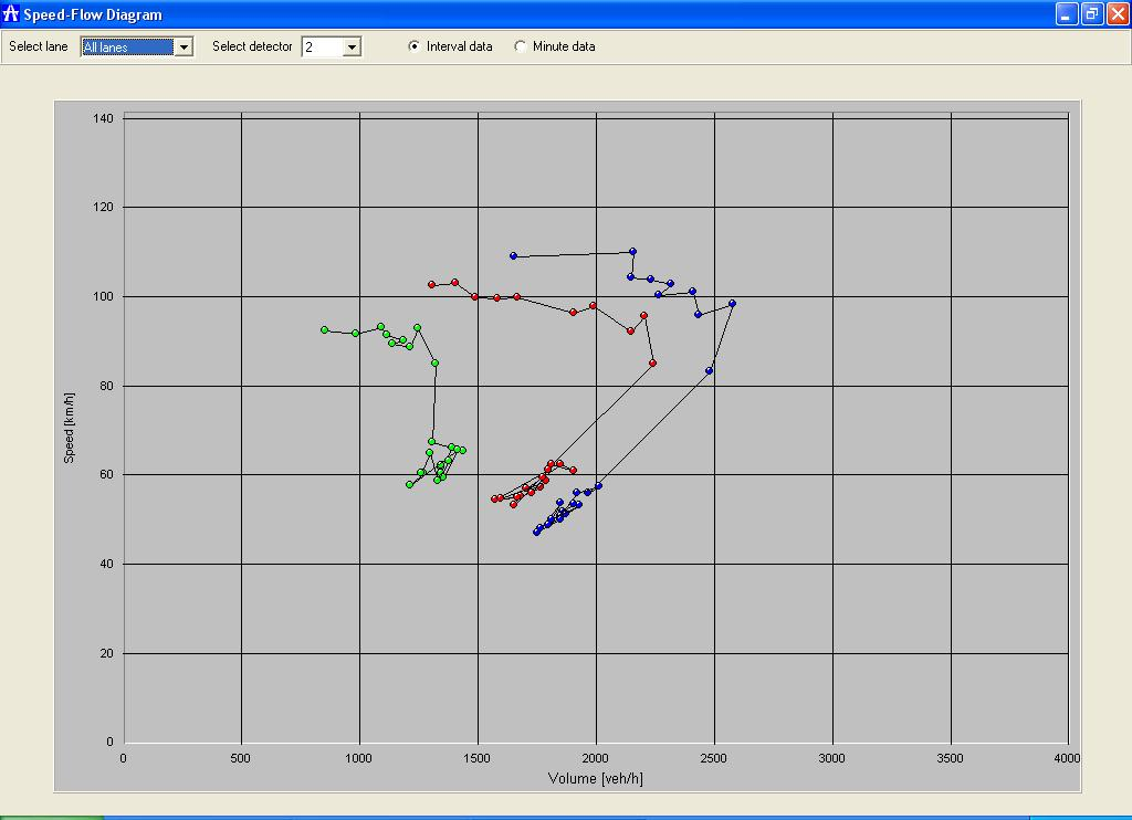 eigen model